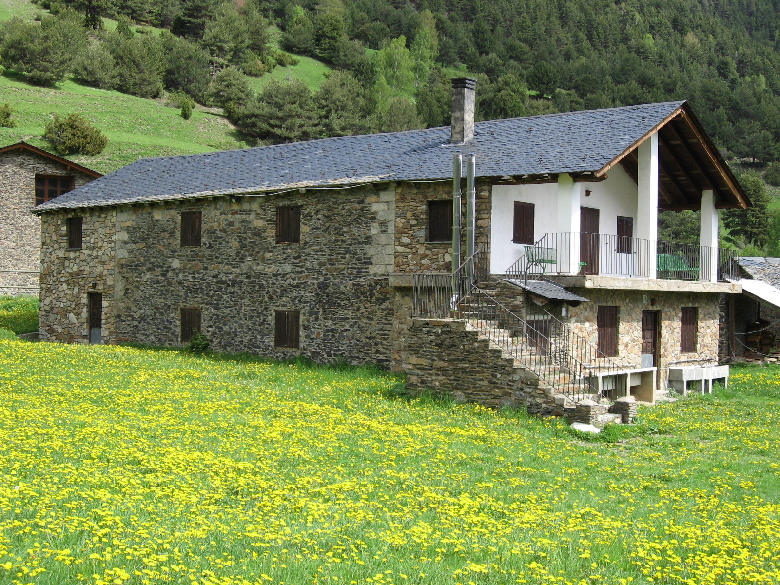 refuges Andorre